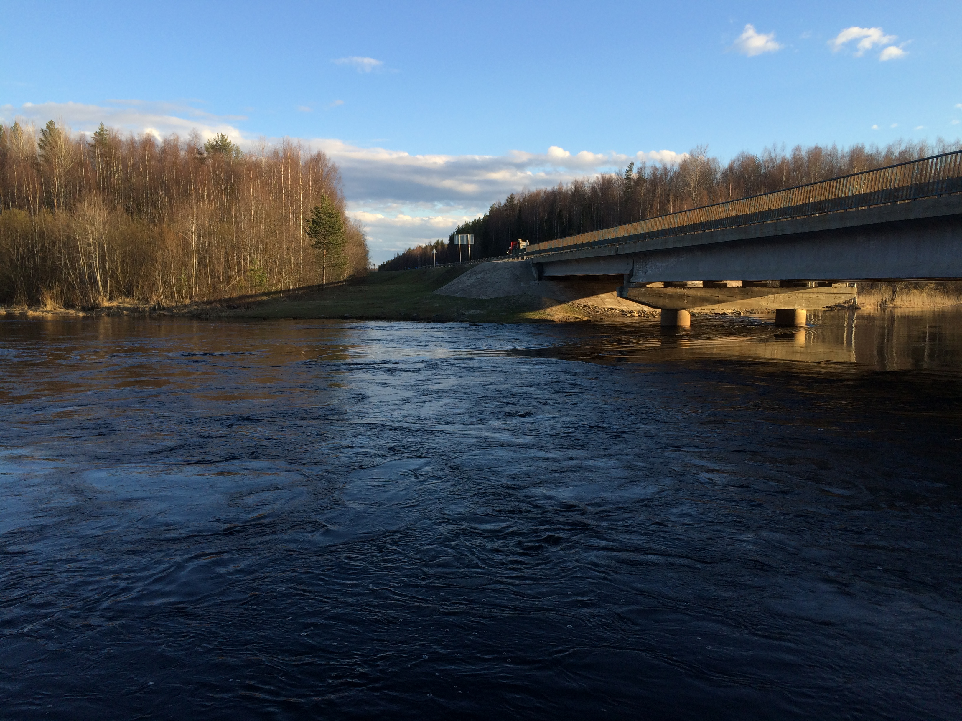 р. Нива (Кондопожский район)